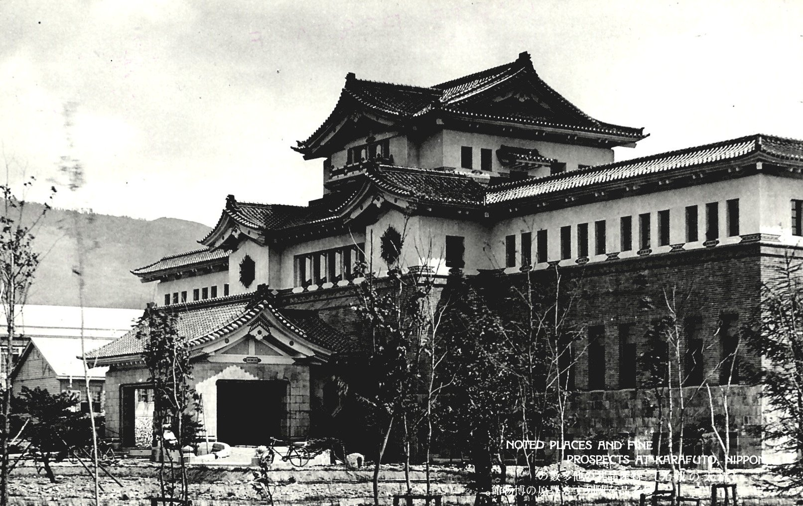 Музей для демонстрации коллекций по естественной истории Карафуто.